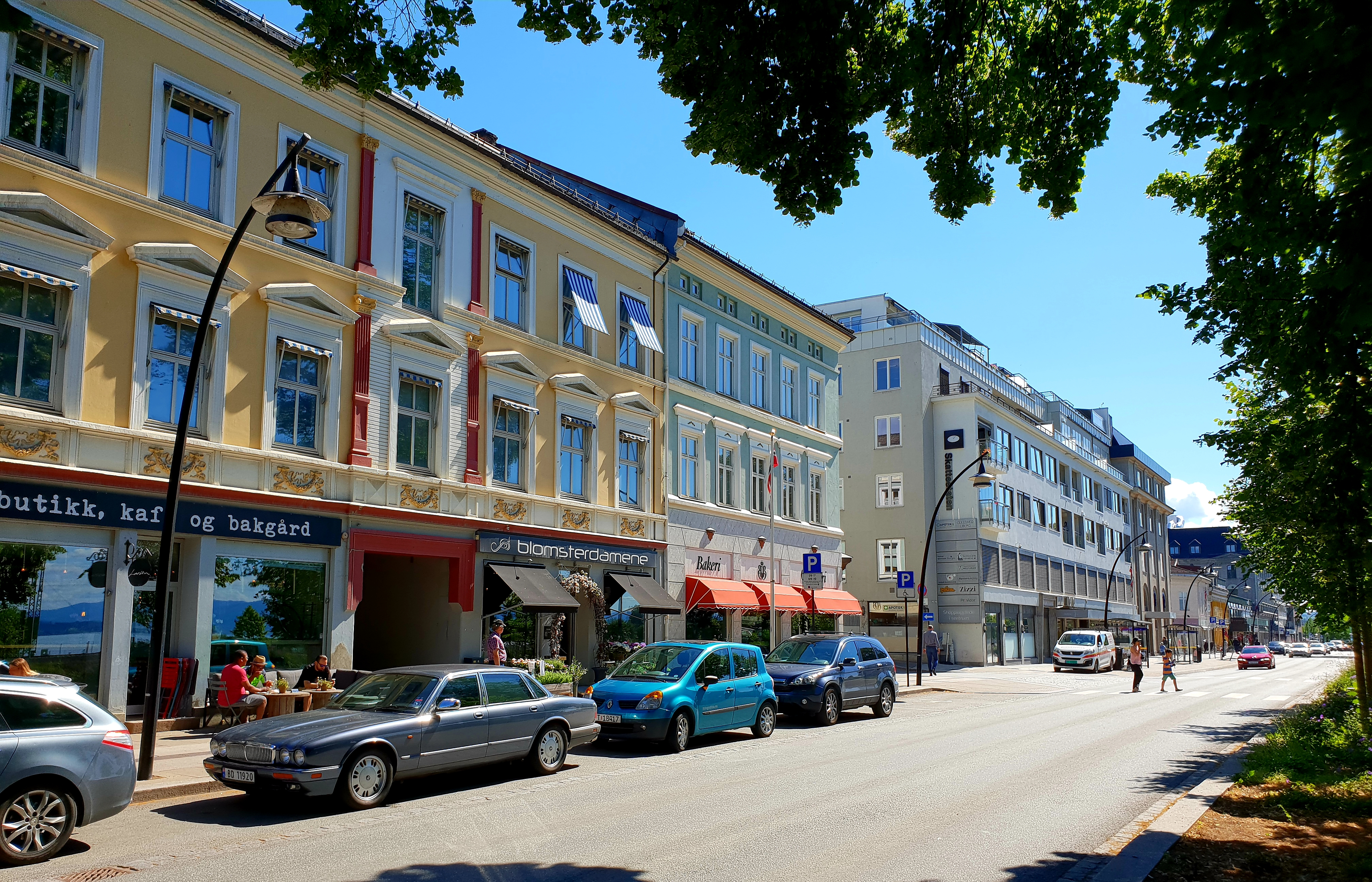 Strandgata i Hamar sentrum